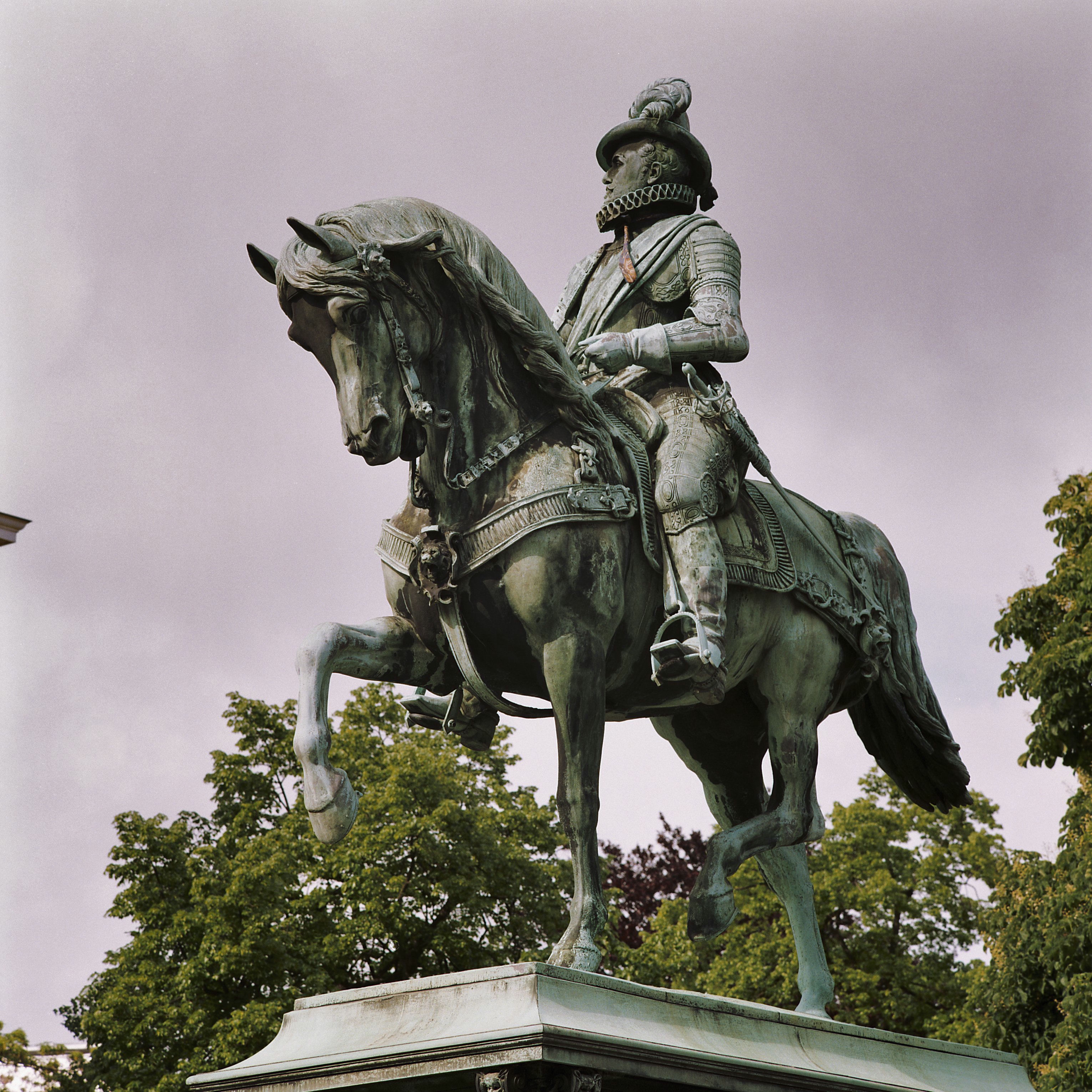 Paleis Noordeinde: Voorzijde ruiterstandbeeld van Willem van Oranje (opmerking: Gemaakt voor boek Monumenten voor Oranje en Nassau)